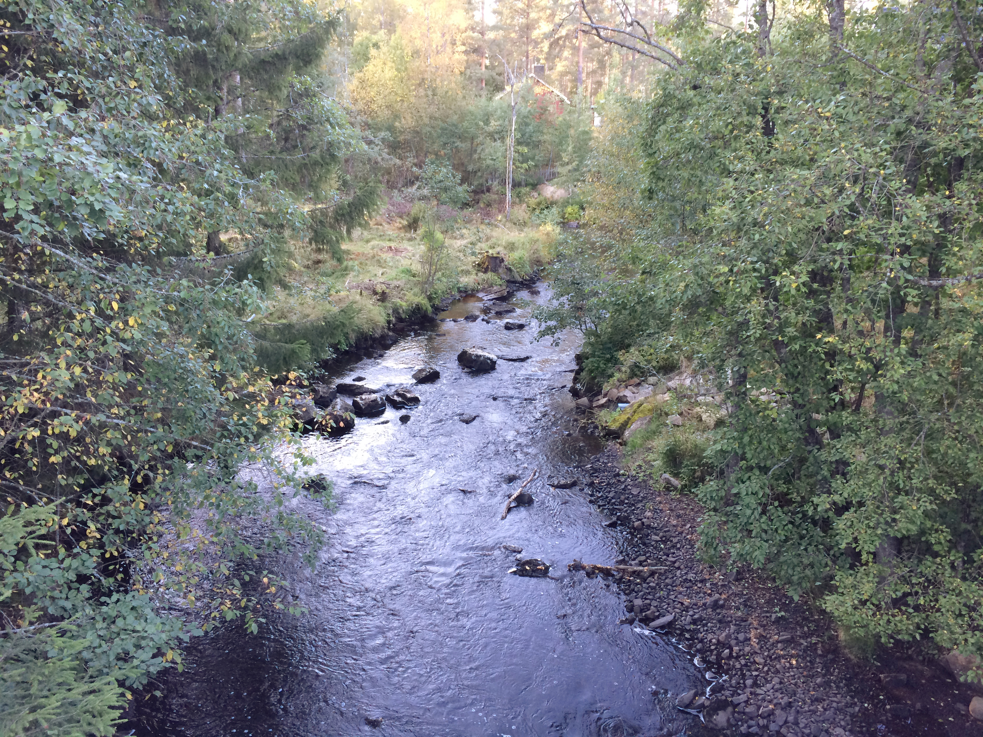 Terningåa like nord for riksvei 3 i utkanten av Elverum